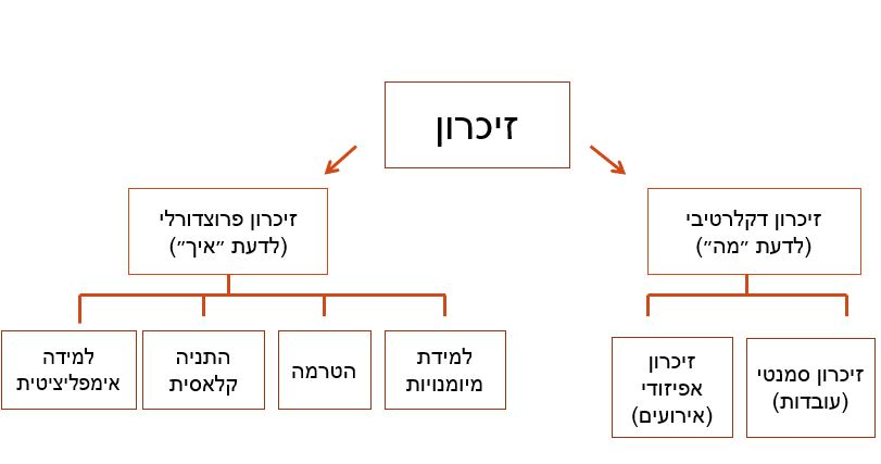 מבנה סכמתי של חלוקת הזיכרון לטווח ארוך למרכיביו על פי Larry R. Squire, 1987.